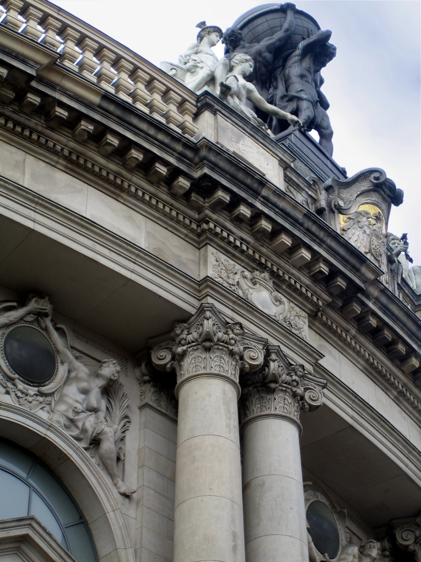 Museum für Kommunikation in Berlin. Detail der Fassade.